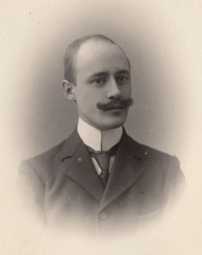 Vinjetterad bröstbild av poeten Jacob Tegengren (1875-1956). This work is in the public domain in its country of origin and other countries and areas where the copyright term is the author's life plus 70 years or fewer. You must also include a United States public domain tag to indicate why this work is in the public domain in the United States. Note that a few countries have copyright terms longer than 70 years: Mexico has 100 years, Jamaica has 95 years, Colombia has 80 years, and Guatemala and Samoa have 75 years. This image may not be in the public domain in these countries, which moreover do not implement the rule of the shorter term. Côte d'Ivoire has a general copyright term of 99 years and Honduras has 75 years, but they do implement the rule of the shorter term. Copyright may extend on works created by French who died for France in World War II (more information), Russians who served in the Eastern Front of World War II (known as the Great Patriotic War in Russia) and posthumously rehabilitated victims of Soviet repressions (more information). This file has been identified as being free of known restrictions under copyright law, including all related and neighboring rights.